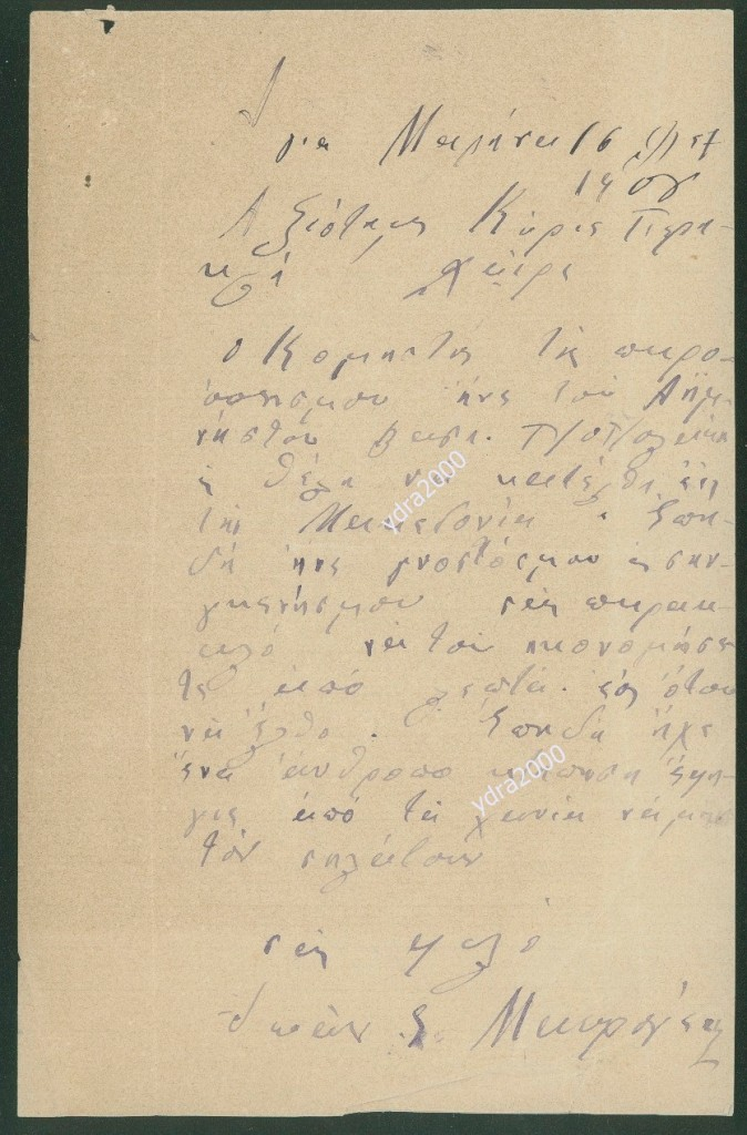 Разписка на Йоанис Маврогенис